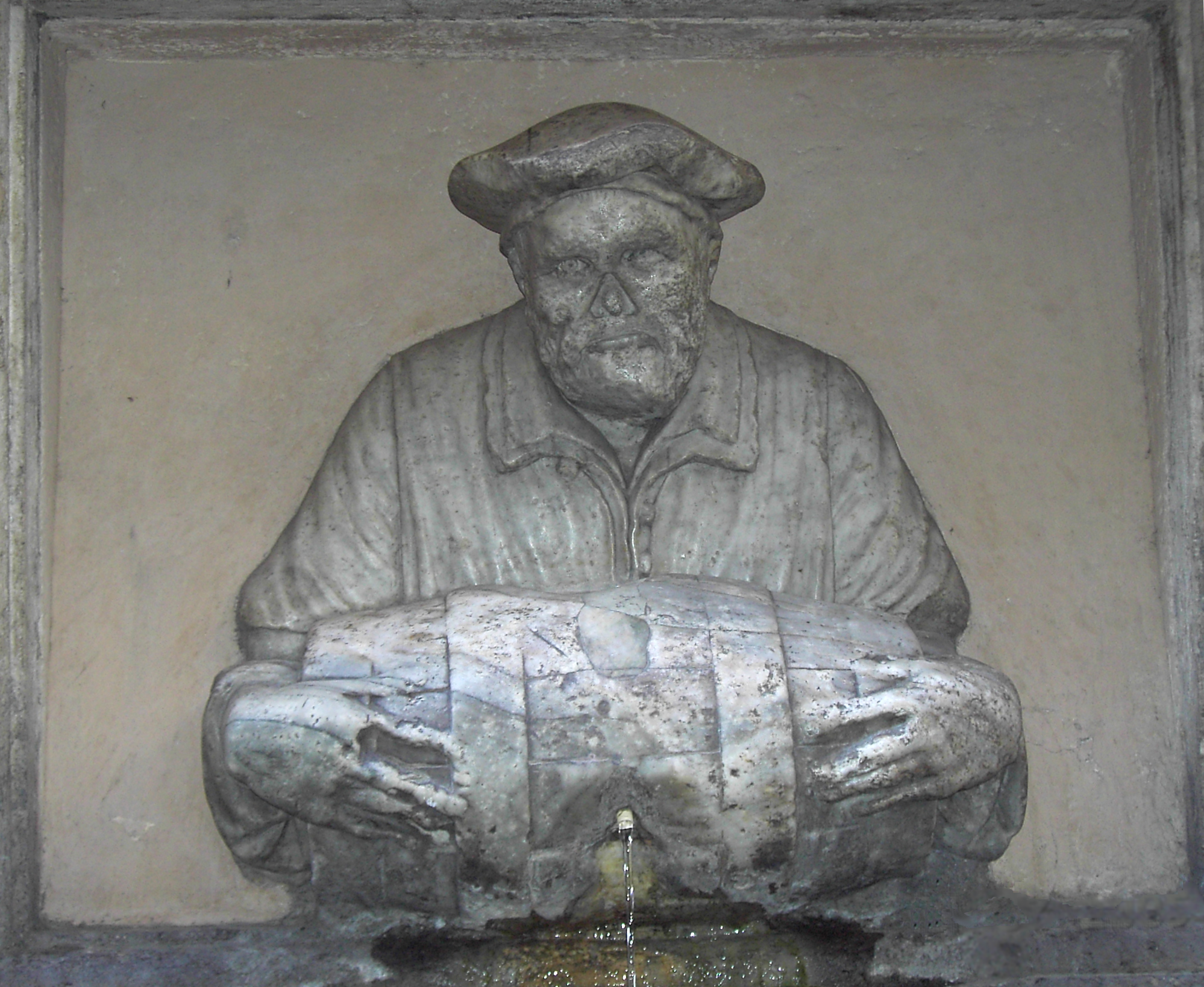 Roma, anzi via del Corso, adesso via Lata, Fontana del Facchino.